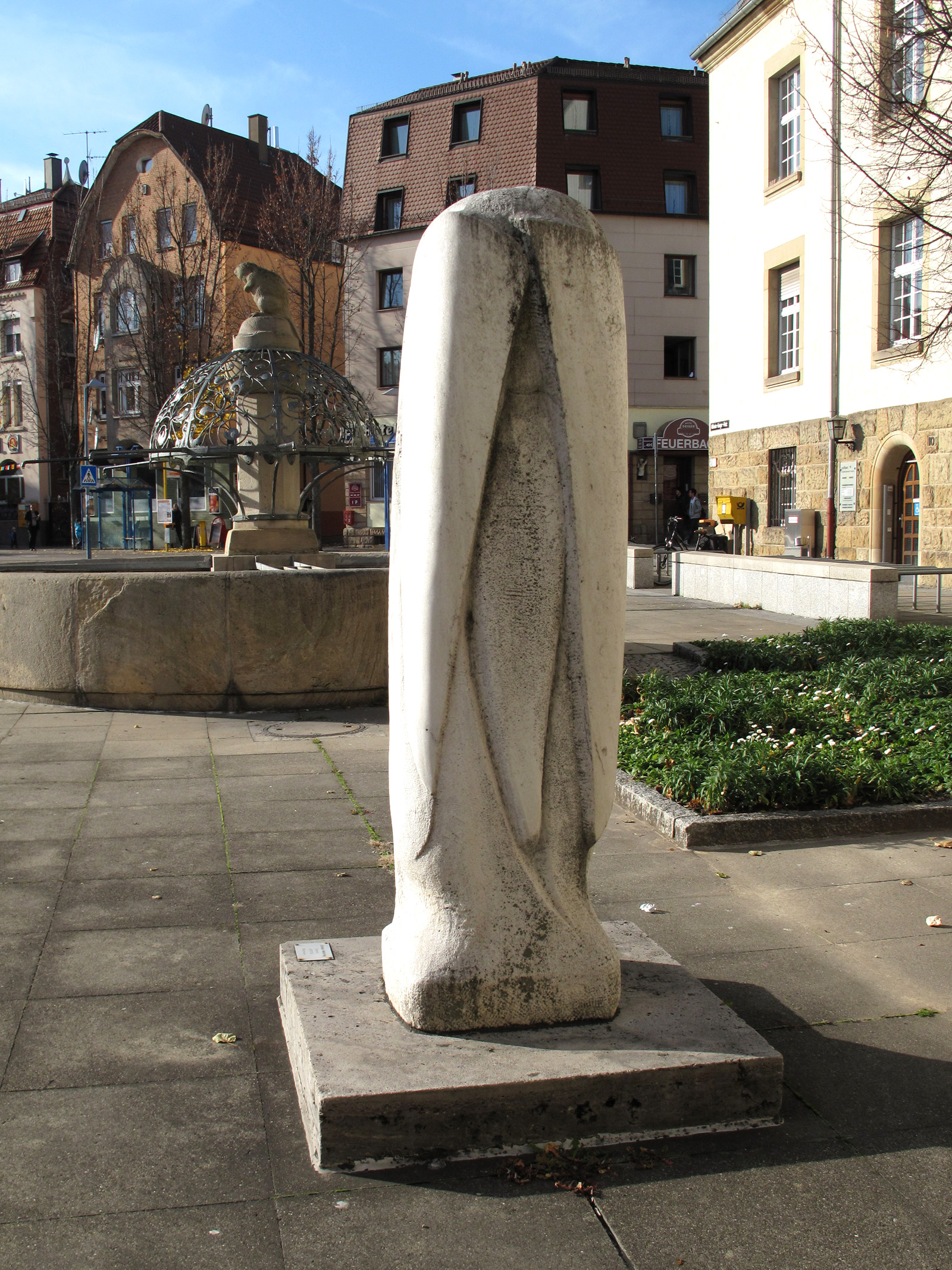 Ottmar Mohring, Cosmic XVIII, 1978, - Stuttgart-Feuerbach, Rathausplatz